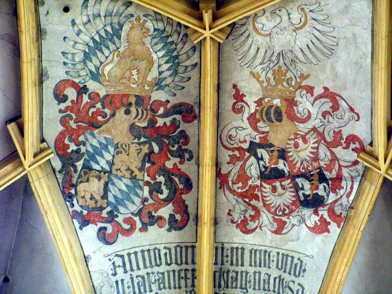 Herzoglich bayerisches Wappen und polnisches Königswappen in der Stadtparrkirche St. Johannes in Dingolfing, für Georg den Reichen (1445–1503) und seine Ehefrau Hedwig von Polen (1457–1502)